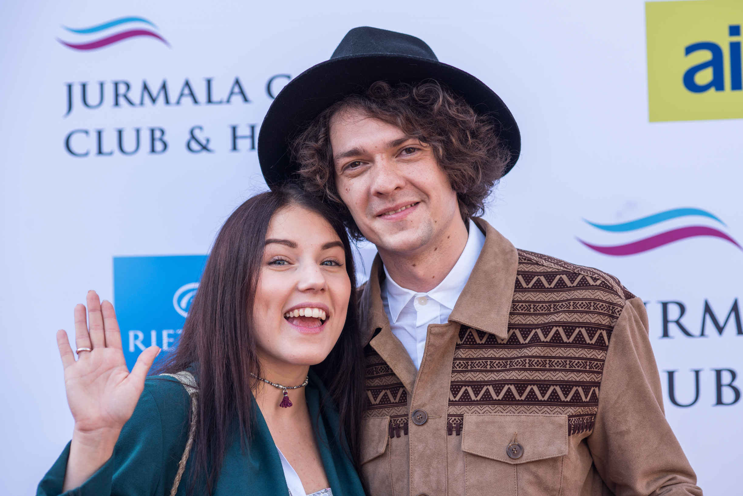 NaviBand на фестивале «Лайма. Рандеву. Юрмала 2017»